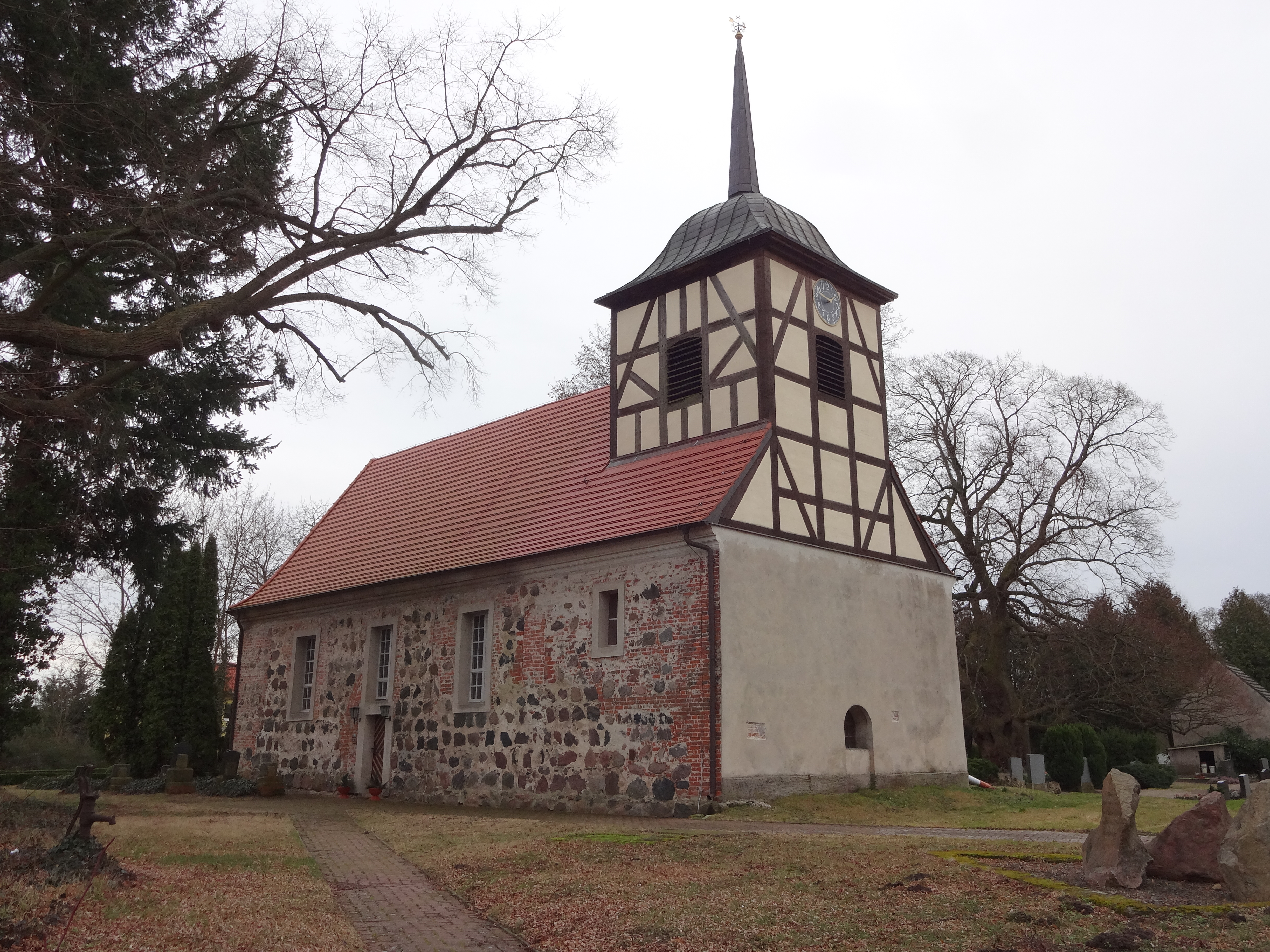 Denkmalgeschützte Dorfkirche in Stechow in der Brandenburg